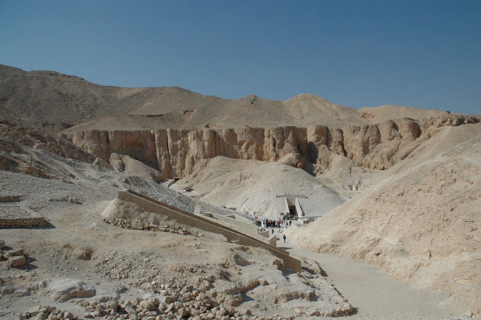 Valle dei Re: panorama